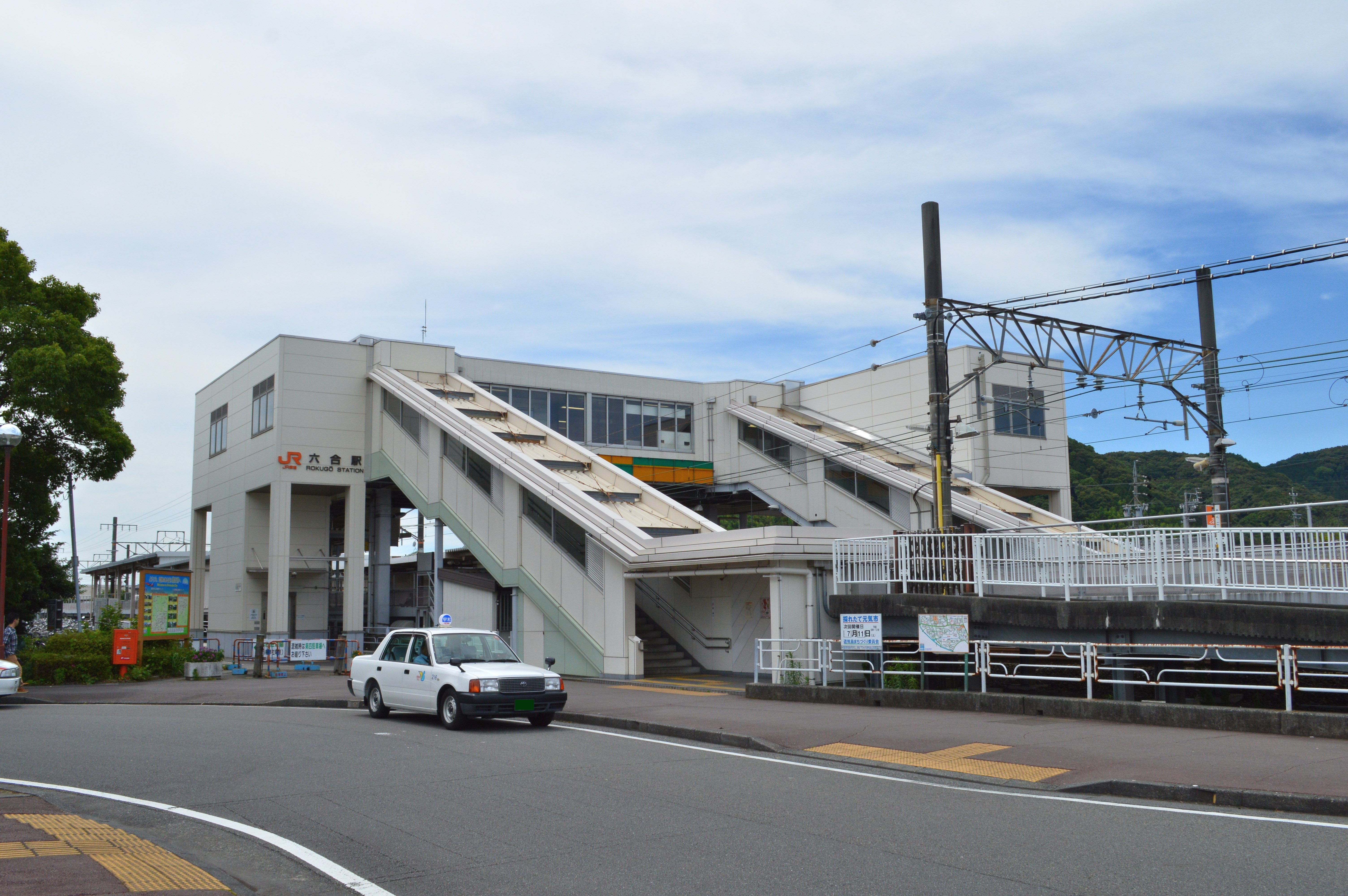 六合駅 南口全景